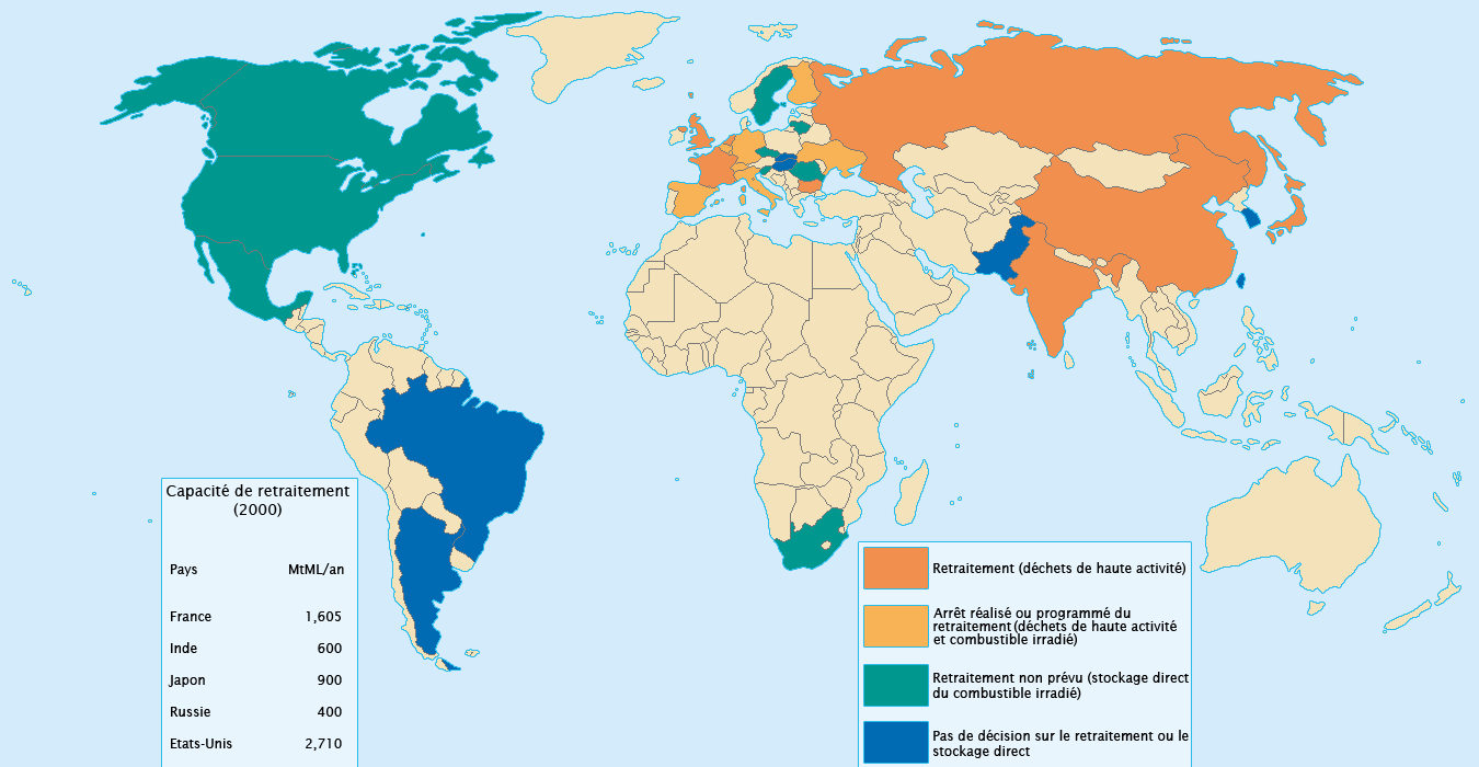 Stratégies de cycle mises en oeuvre de par le monde.